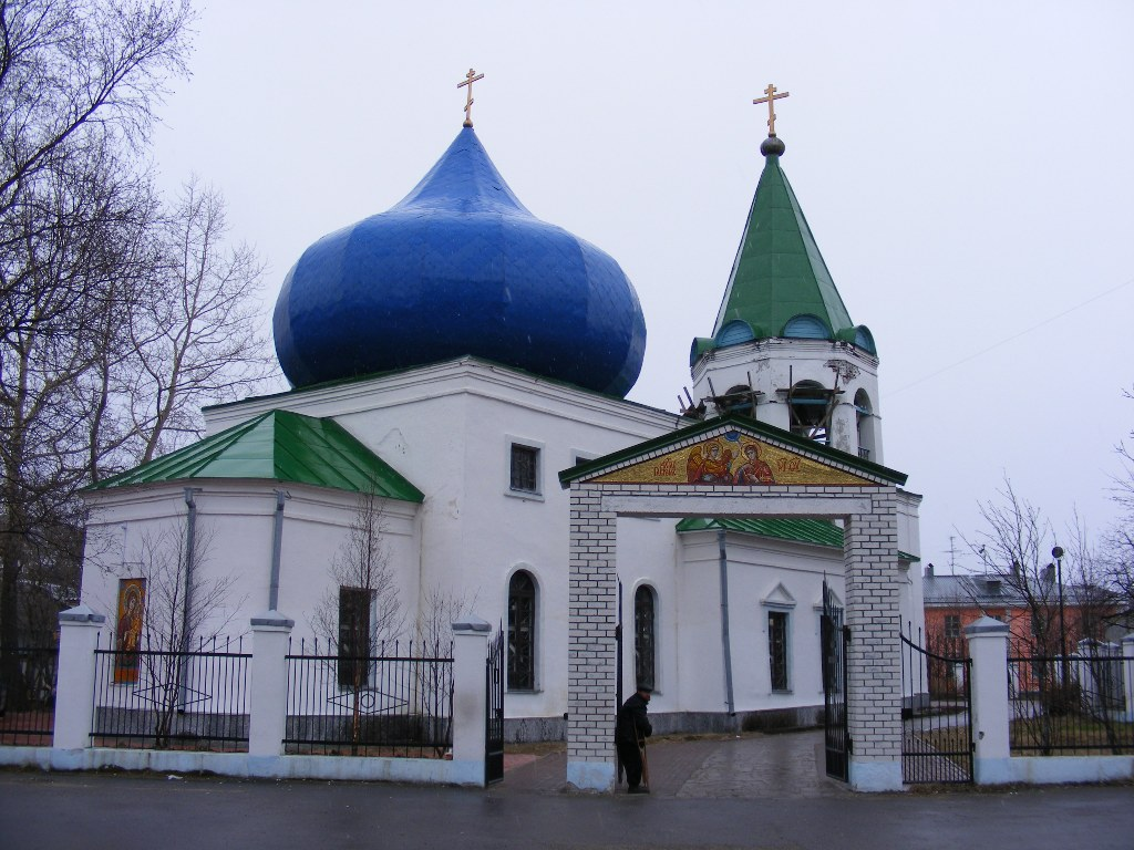 Благовещенская церковь (Кола)